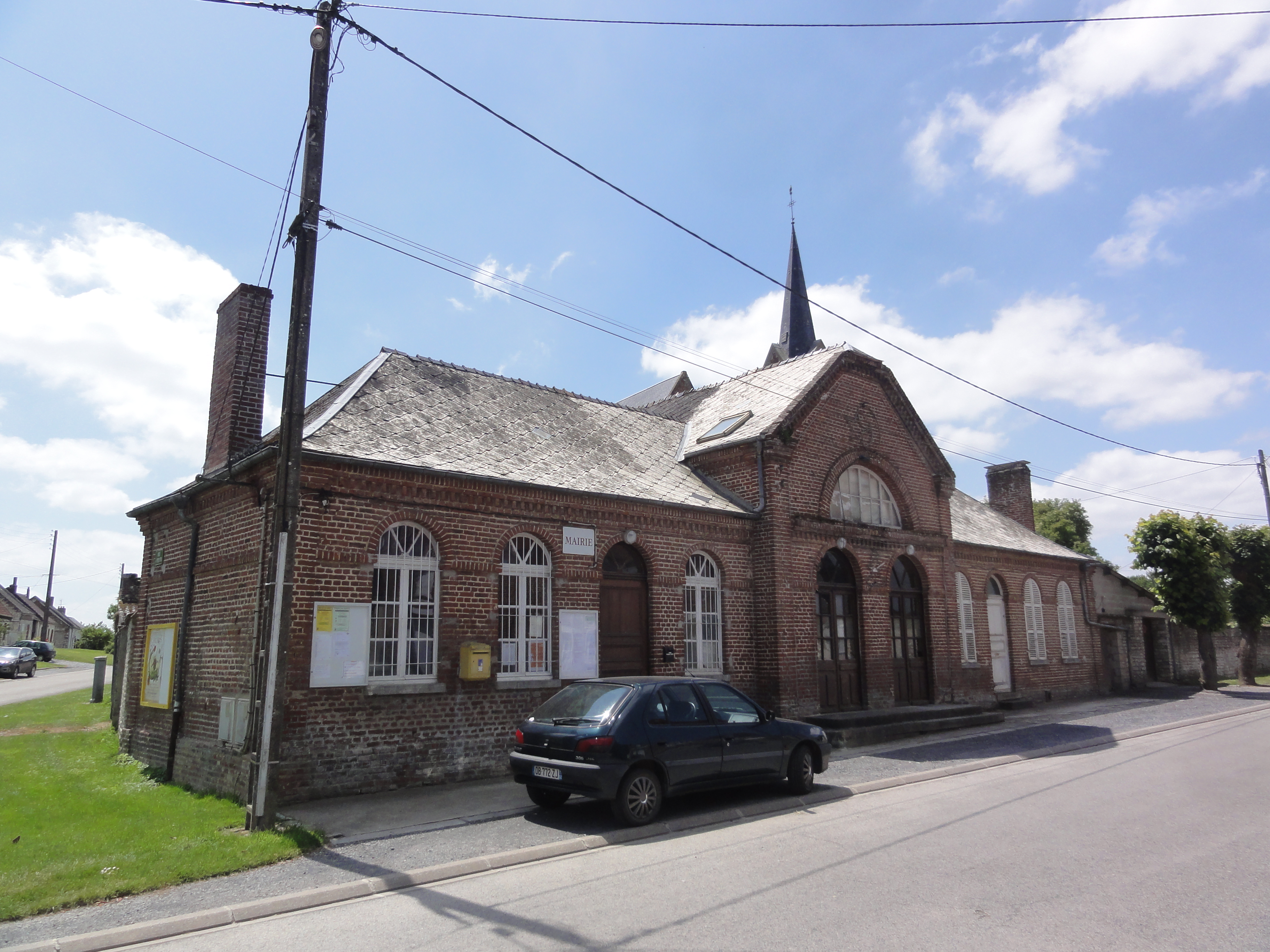 Montigny-le-Franc (Aisne) mairie